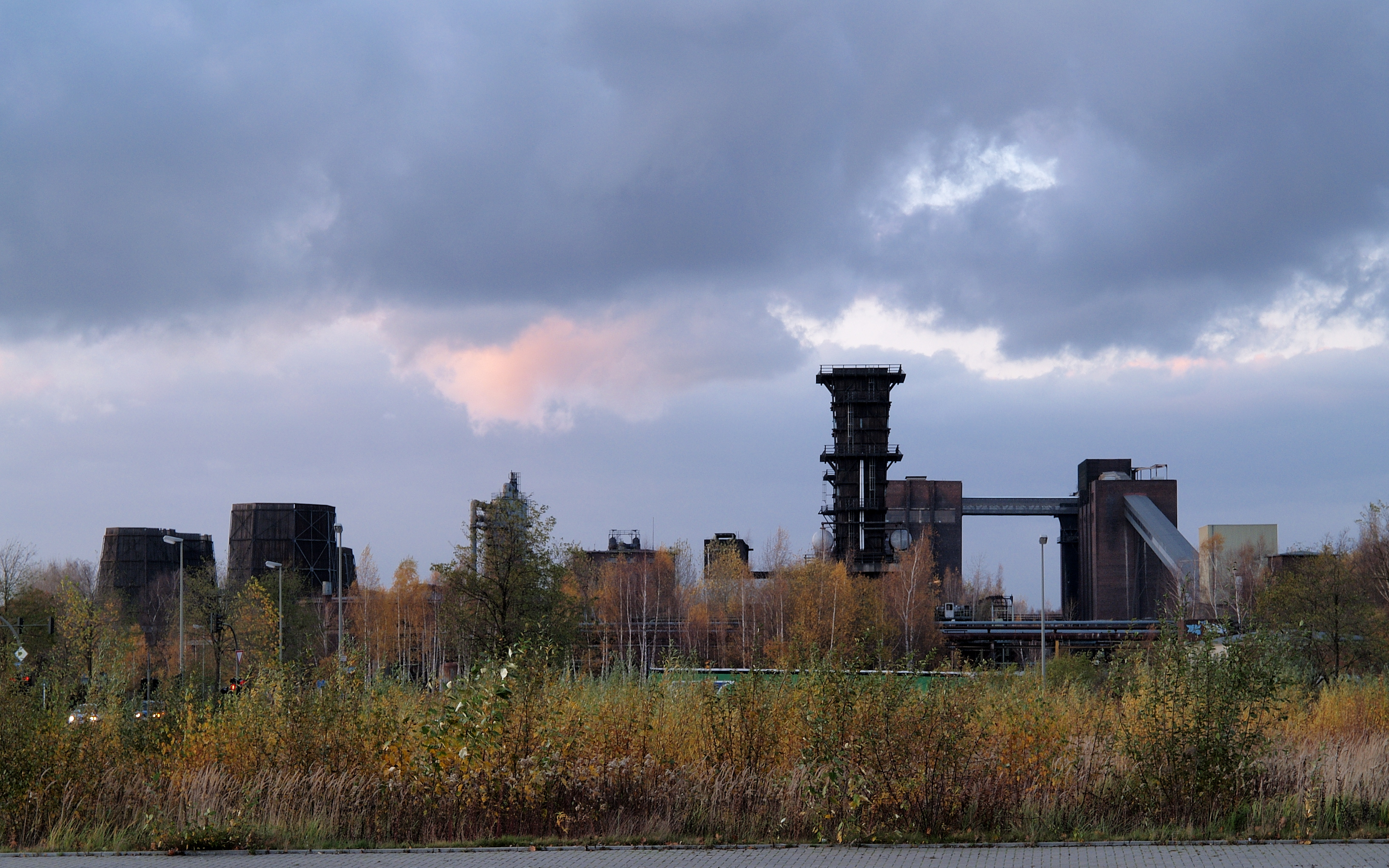 Anlagen der stillgelegten Kokerei Hansa in Dortmund, von Süden aus gesehen